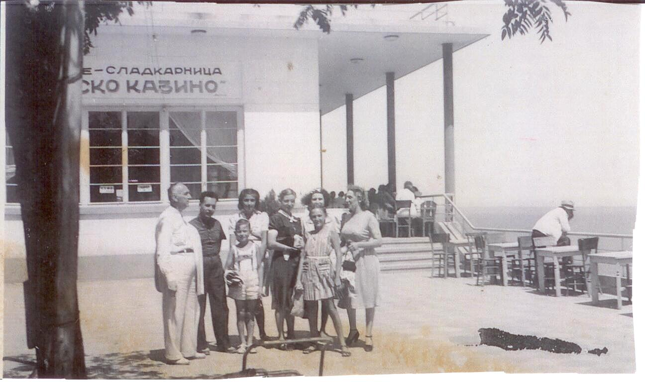 Старото казино